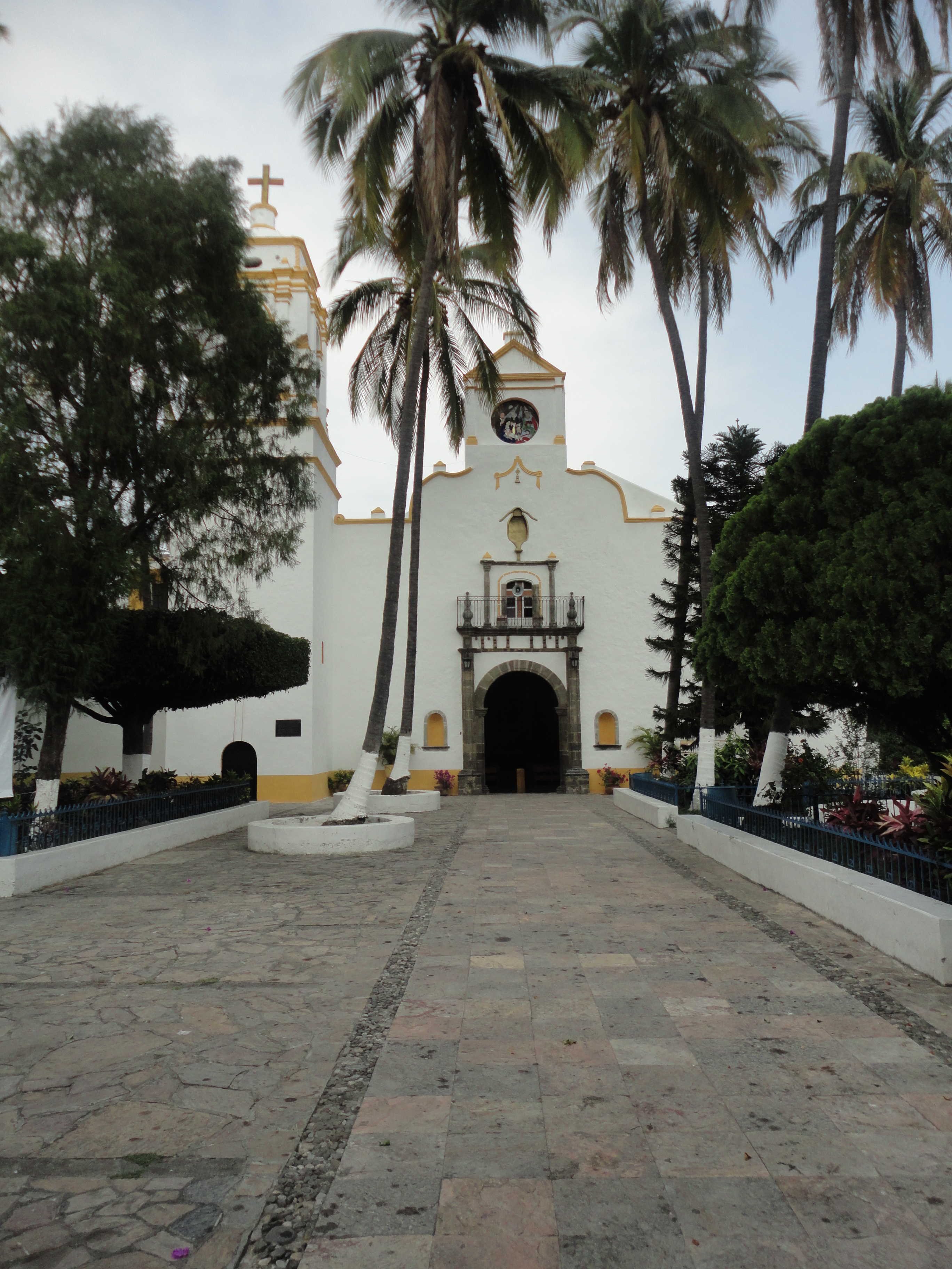 Iglesia de coatlan